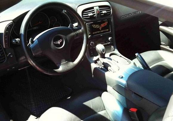 Corvette C6 Innenraum